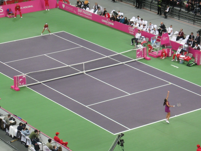 Ana Ivanović and Ai Sugiyama at Serbia vs. Japan Fed Cup tie